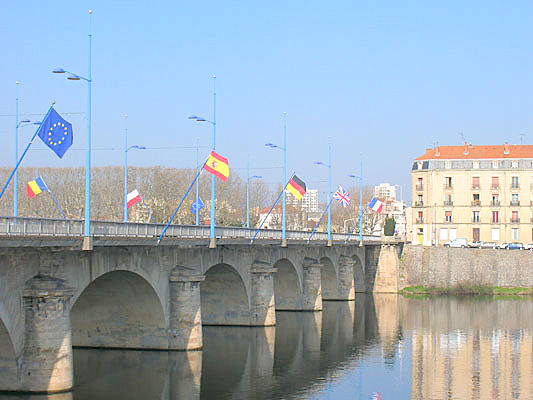 Le Pont sur la Loire à Roanne